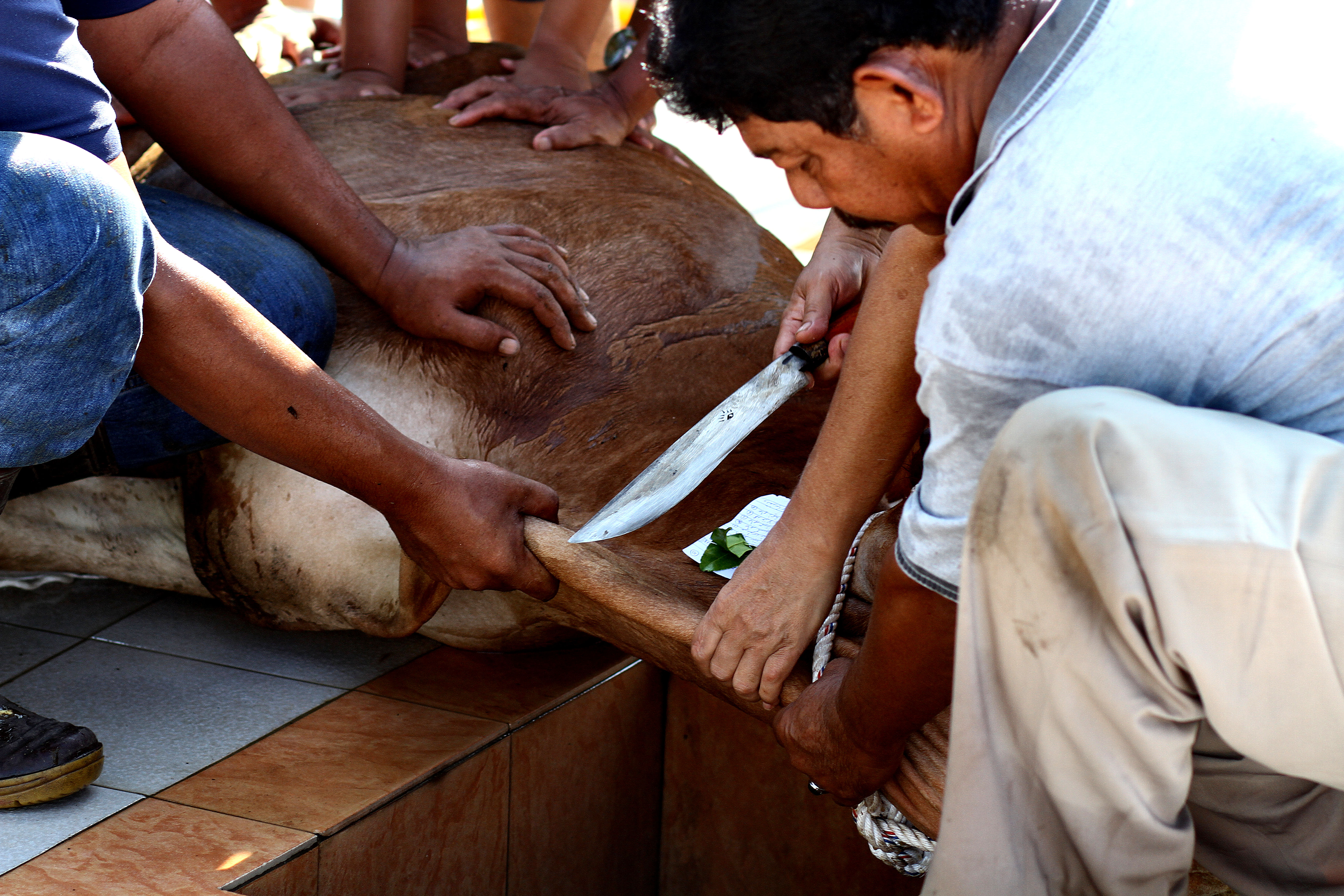 2012 korban qurban outdoor event festival islam muslim negeri sembilan malaysia